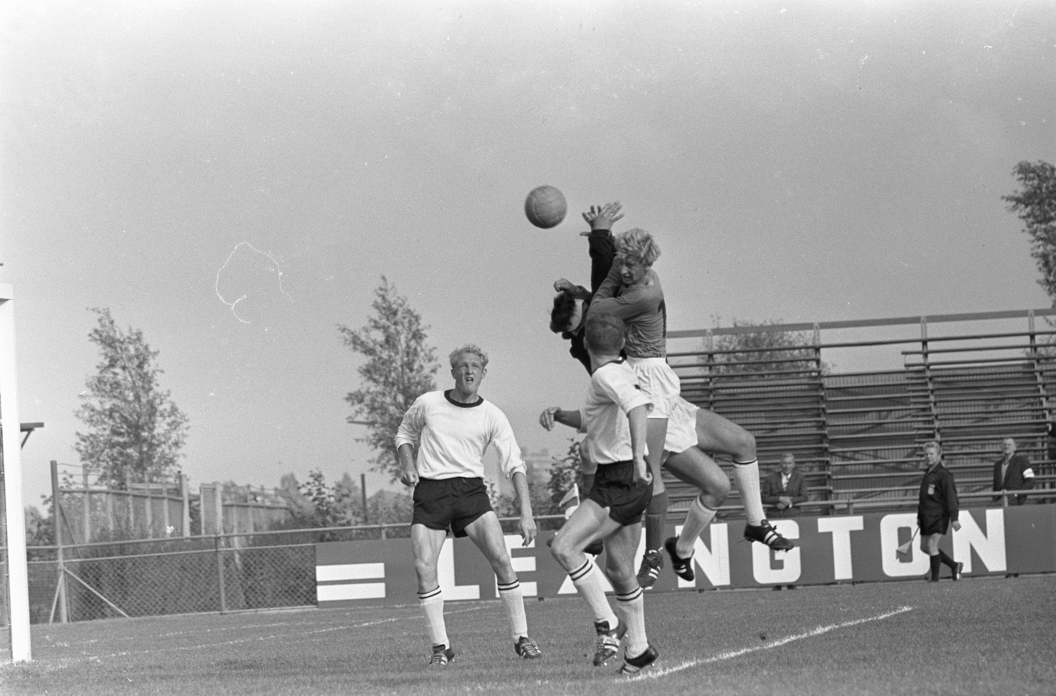 Collectie / Archief : Fotocollectie Anefo Reportage / Serie : Voetbalwedstrijd van de Volewijckers tegen FC Den Bosch te Amsterdam: 1-2 Beschrijving : Speler Dries Boszhard van de Volewijckers in duel met keeper Van Dijkhuizen Datum : 4 september 1966 Locatie : Amsterdam, Noord-Holland Trefwoorden : sport, voetbal Persoonsnaam : Boszhard, Dries Fotograaf : Pieter Jongerhuis / Anefo Auteursrechthebbende : Nationaal Archief Materiaalsoort : Negatief (zwart/wit) Nummer archiefinventaris : bekijk toegang 2.24.01.05 Bestanddeelnummer : 919-5266